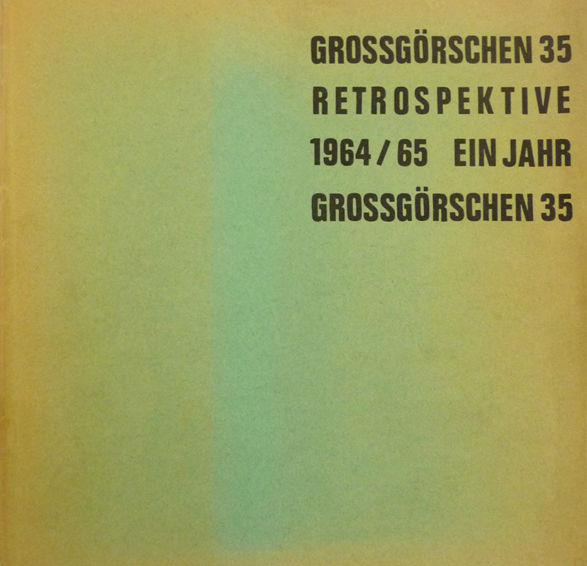 Katalog GROSSGÖRSCHEN 35 RETROSPEKTIVE 1964/65 EIN JAHR GROSSGÖRSCHEN 35, C. G. Fahle Verlag, Münster 1965 - Erste Auflage